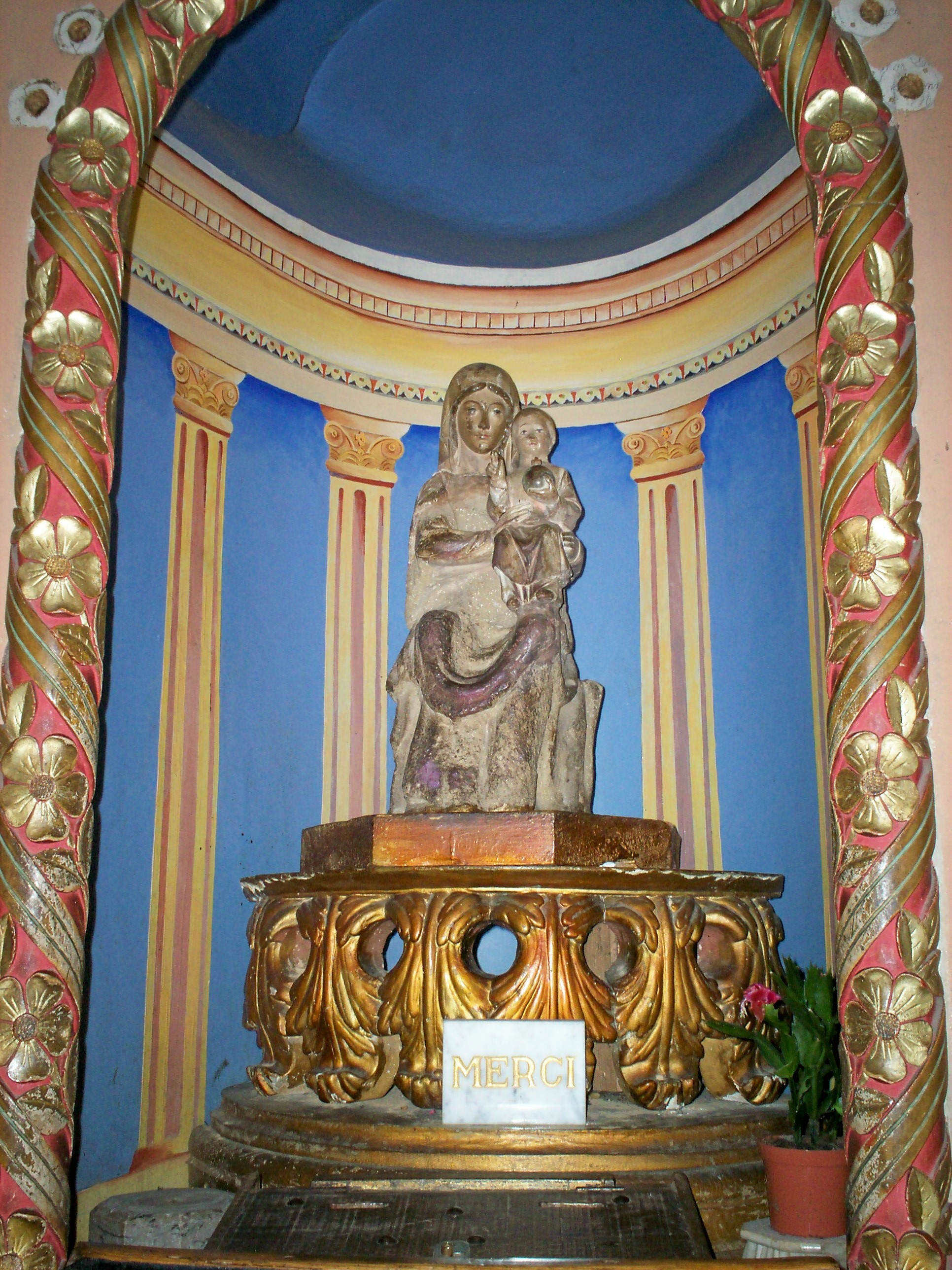 Verge.